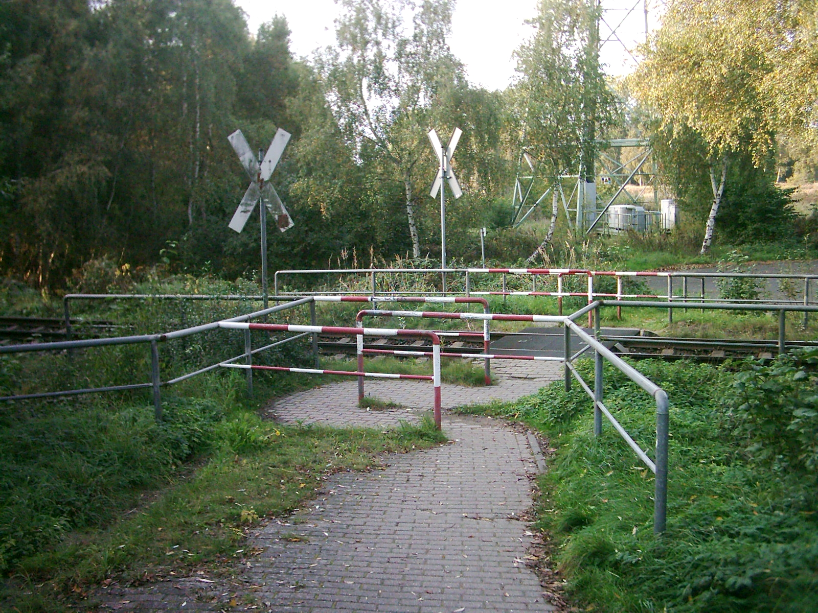 Fußgänger-Bahnübergang mit Umlaufgitter in Hamburg-Moorburg.